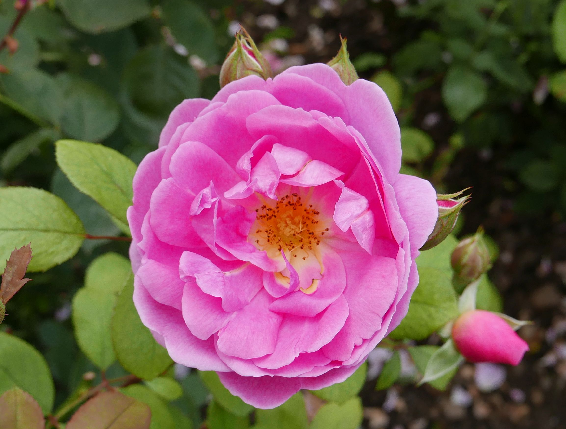 Rosa 'John Clare' David Austin, Rosarium Sangerhausen, August 2017